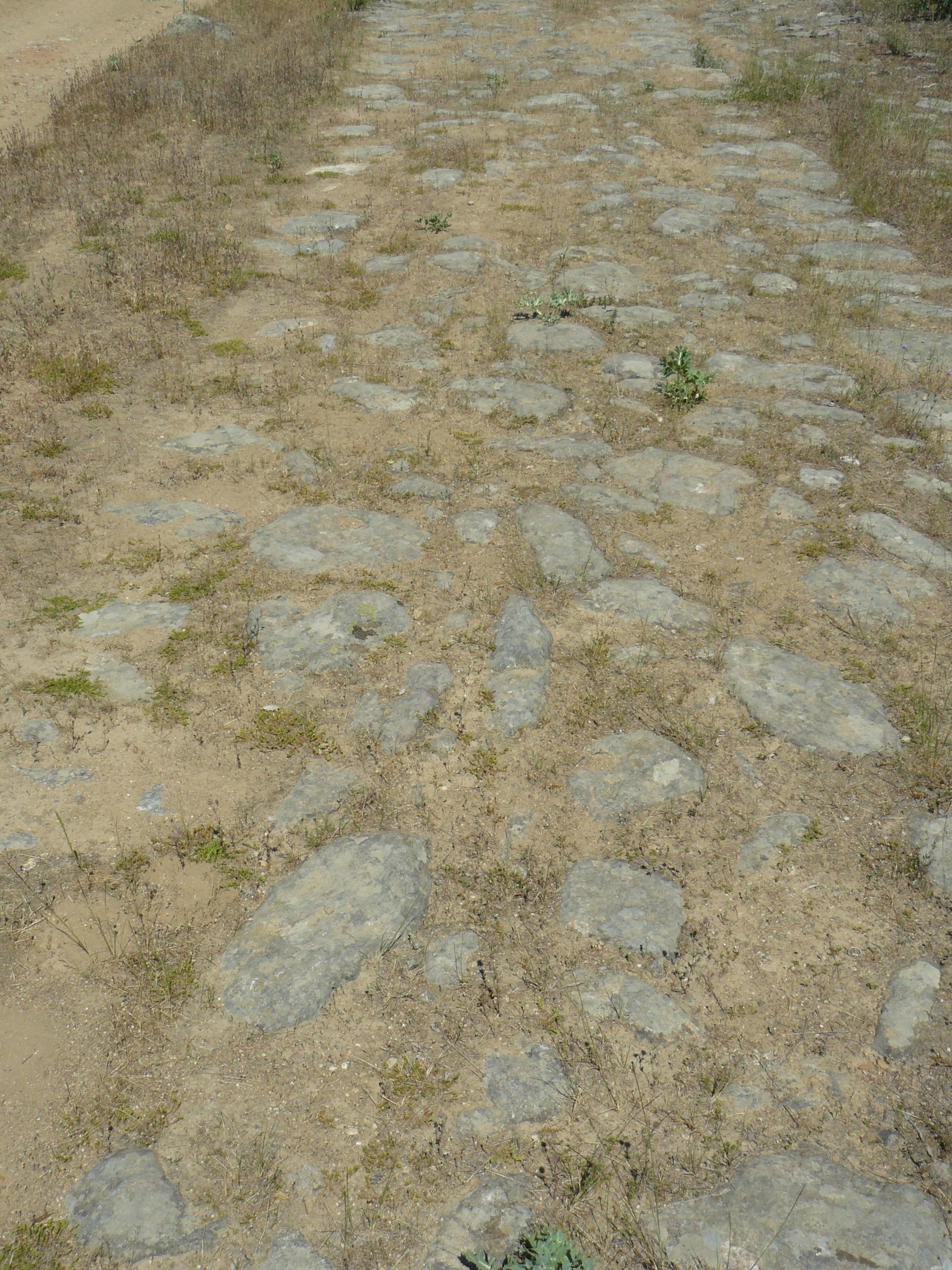 Revenga, Segovia.